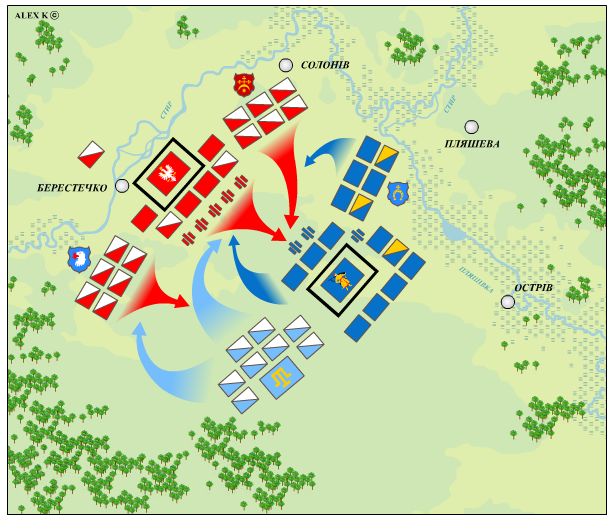 Битва під Берестечком